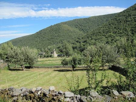 El campo delante de la iglesia en Montrondo